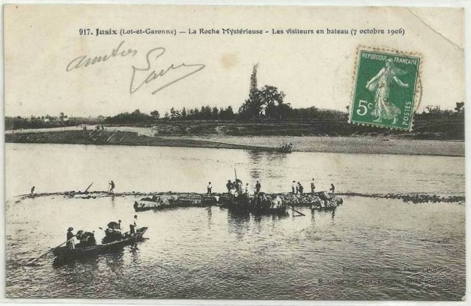 Jusix - La roche mystérieuse - Les visiteurs en bateau